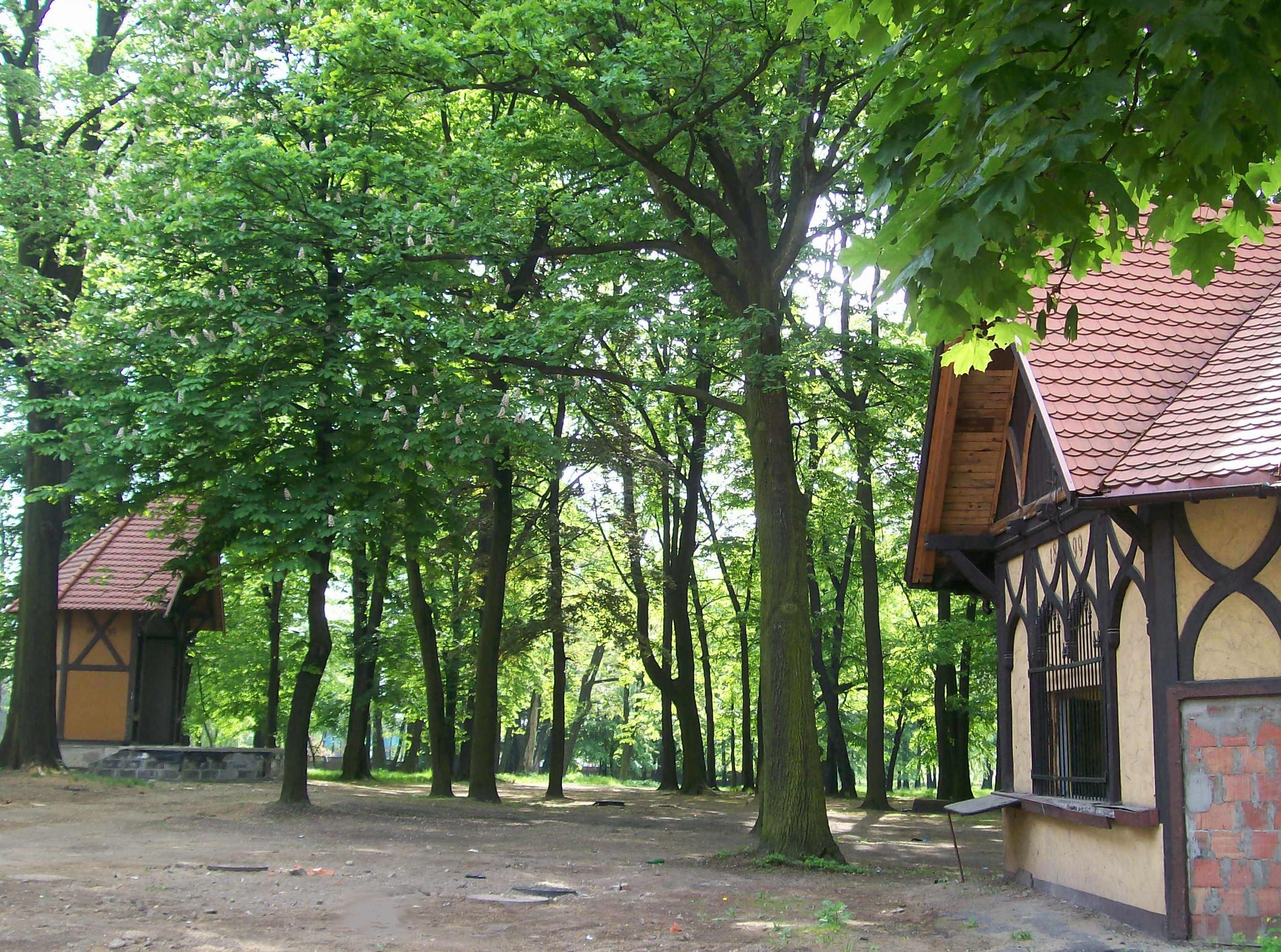 Zespół pałacowy w Tychach ul. Katowicka 2. Park Browarniany z muszlą koncertową i pijalnią piwa z 1899 roku.